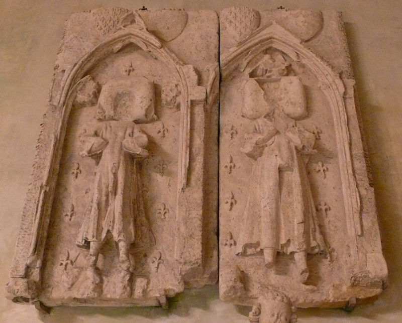 Louis et Philippe dÁlencon, fils de Pierre dÁlencon